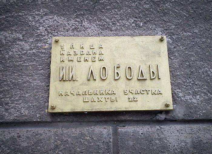 Мемориальная доска «Улица им. И. И. Лободы», Караганда